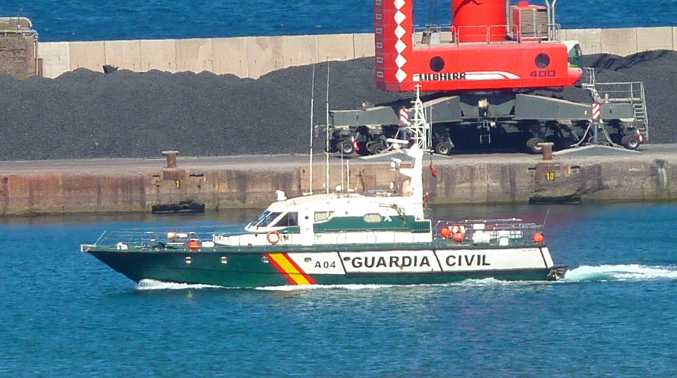 Patrullera Río Nalón de la Guardia Civil.